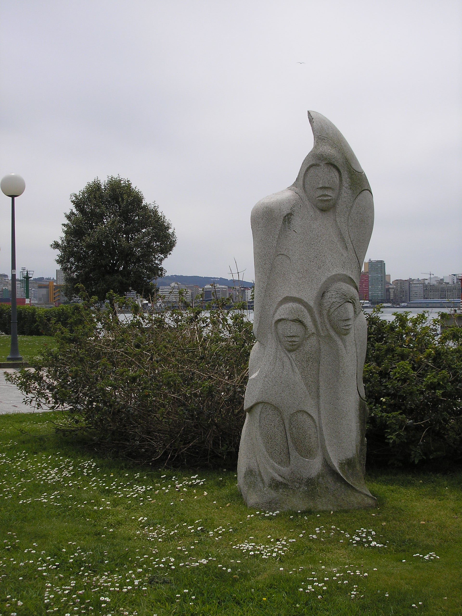 Di unha lousa xunto á escultura: "Este monumento foi inaugurado polo Excmo. Sr. D. Manuel Fraga Iribarne, Presidente da Xunta de Galicia, sendo Alcalde da Coruña o Excmo. Sr. D. Francisco Vázquez Vázquez, en homenaxe ó pobo da Coruña e ós seus fillos, que fixeron posible esta importante xesta sanitaria en beneficio de toda a humanidade". Categoría:Imaxes da Coruña